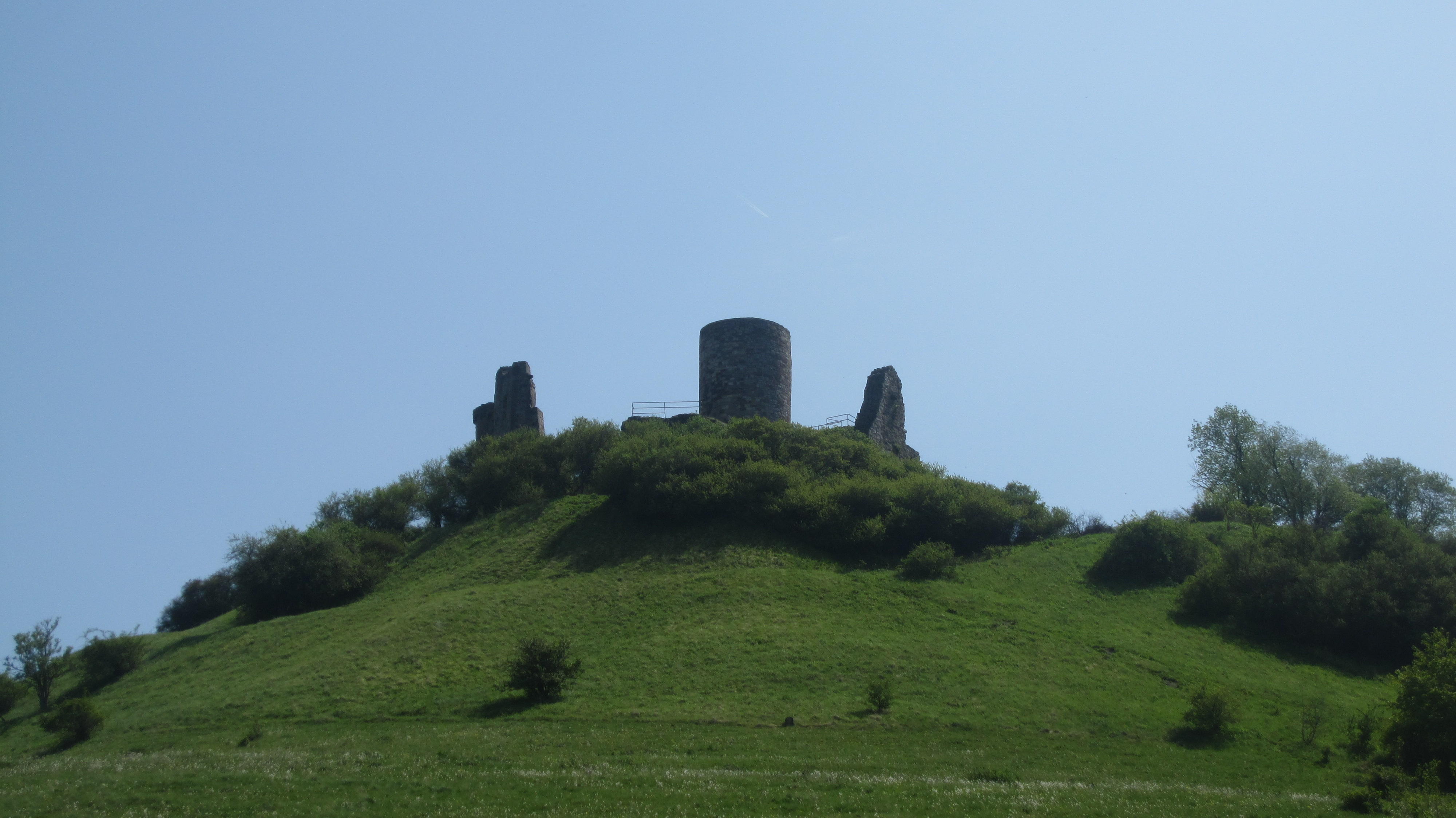 Ruine Burg Desenberg auf dem Desenberg bei Warburg.